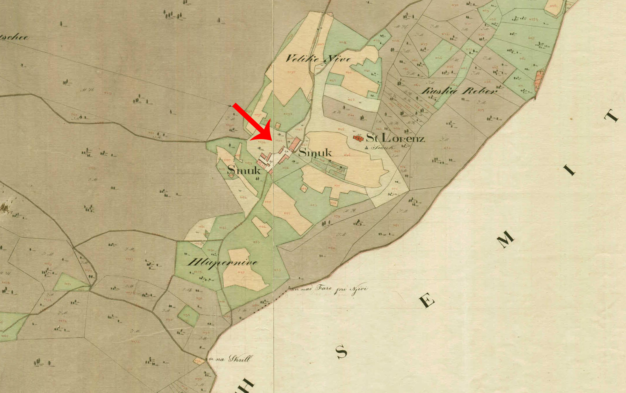 Franciscejski kataster za Kranjsko, 1823-1869